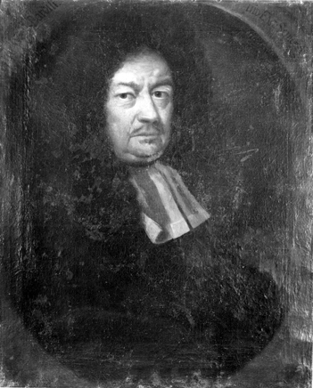 Burckhard Bardili; Gemälde aus der Professorengalerie der Universität Tübingen